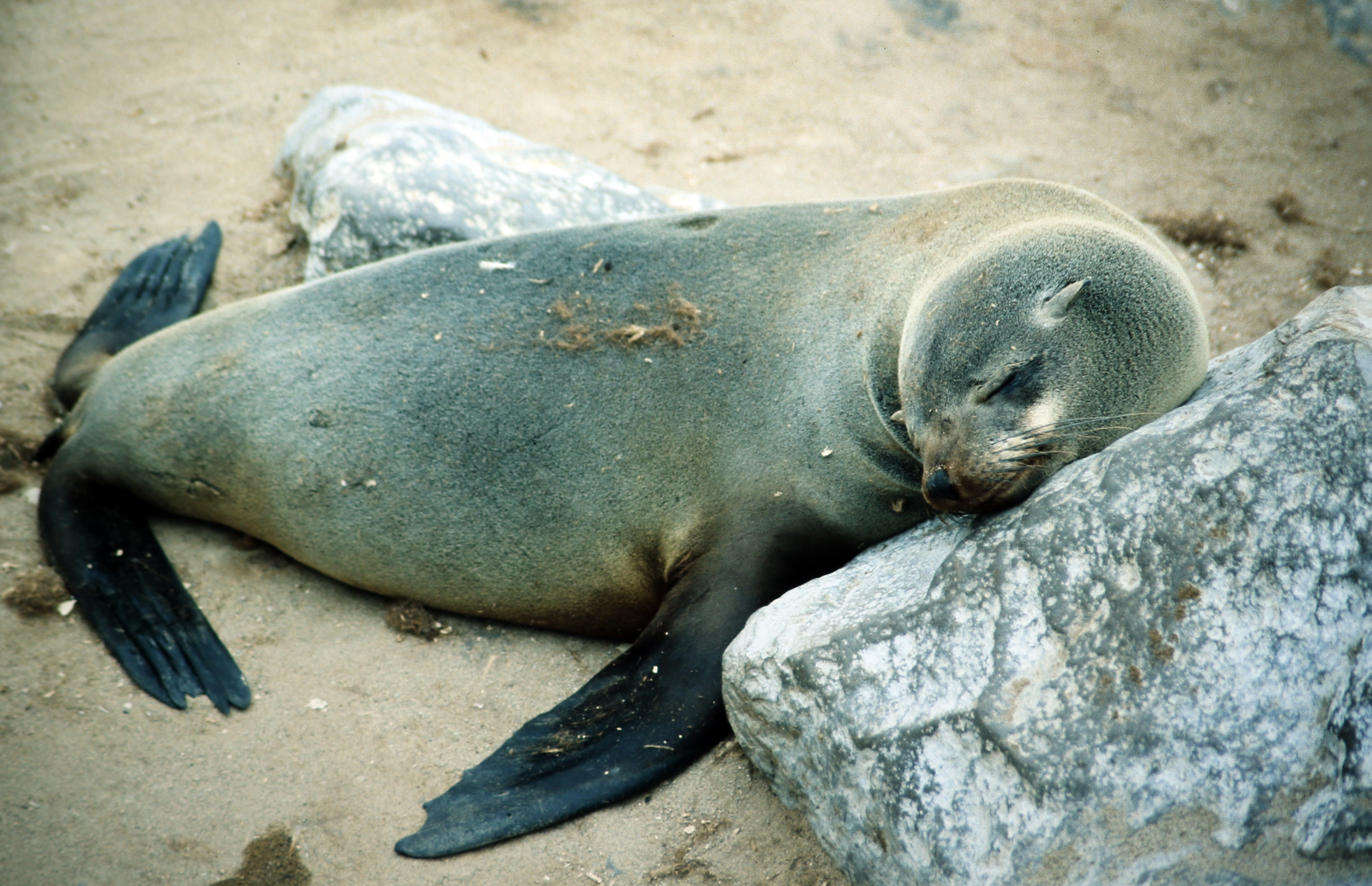 Ohrenrobbe am Kreuzkap